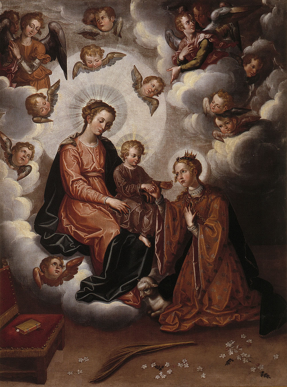 La obra representa los desposorios místicos de la virgen y mártir Santa Inés de Roma, que aparece arrodillada ante la Virgen María y el Niño Jesús.